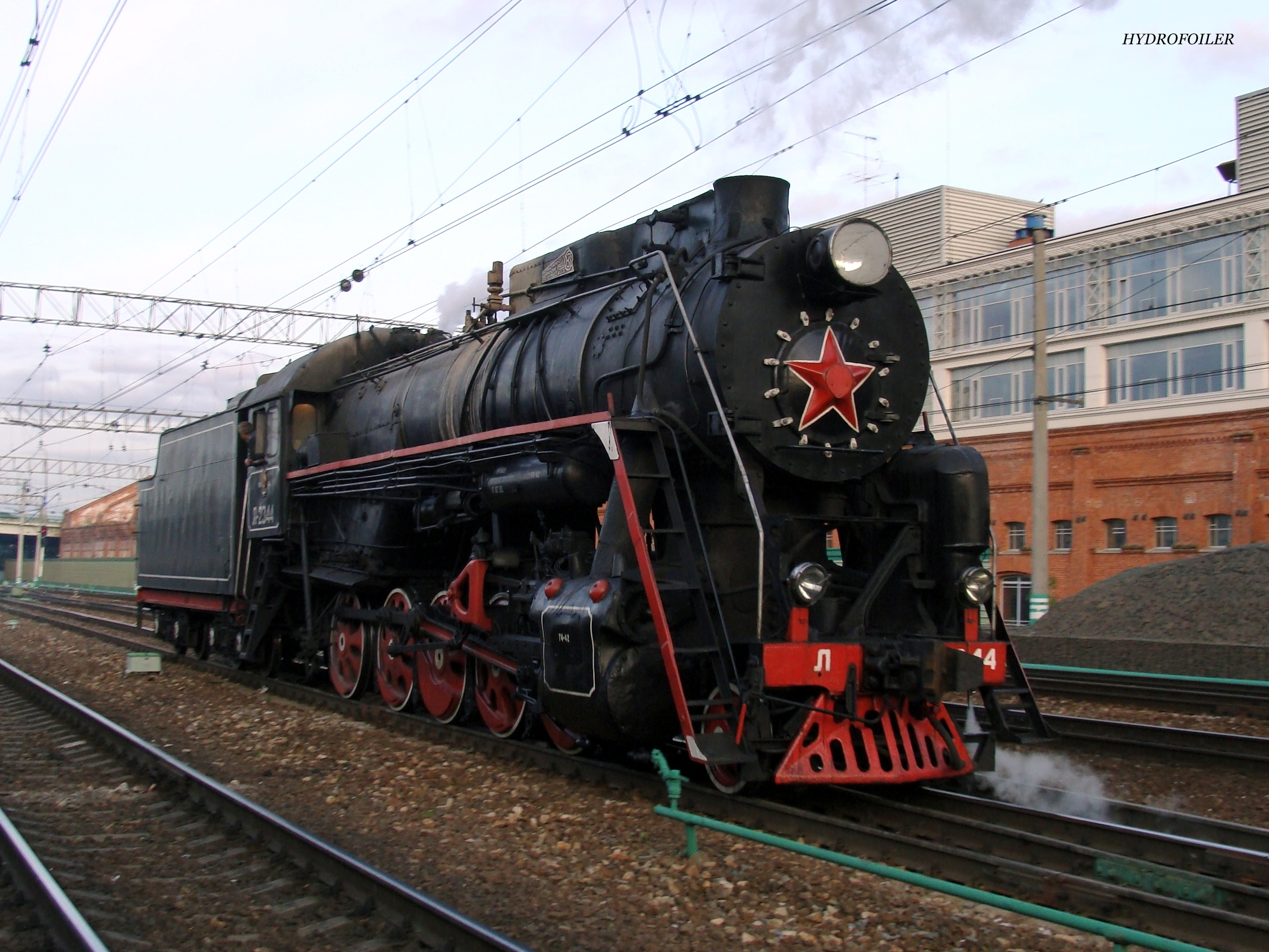 ПАРОВОЗ Л-2344